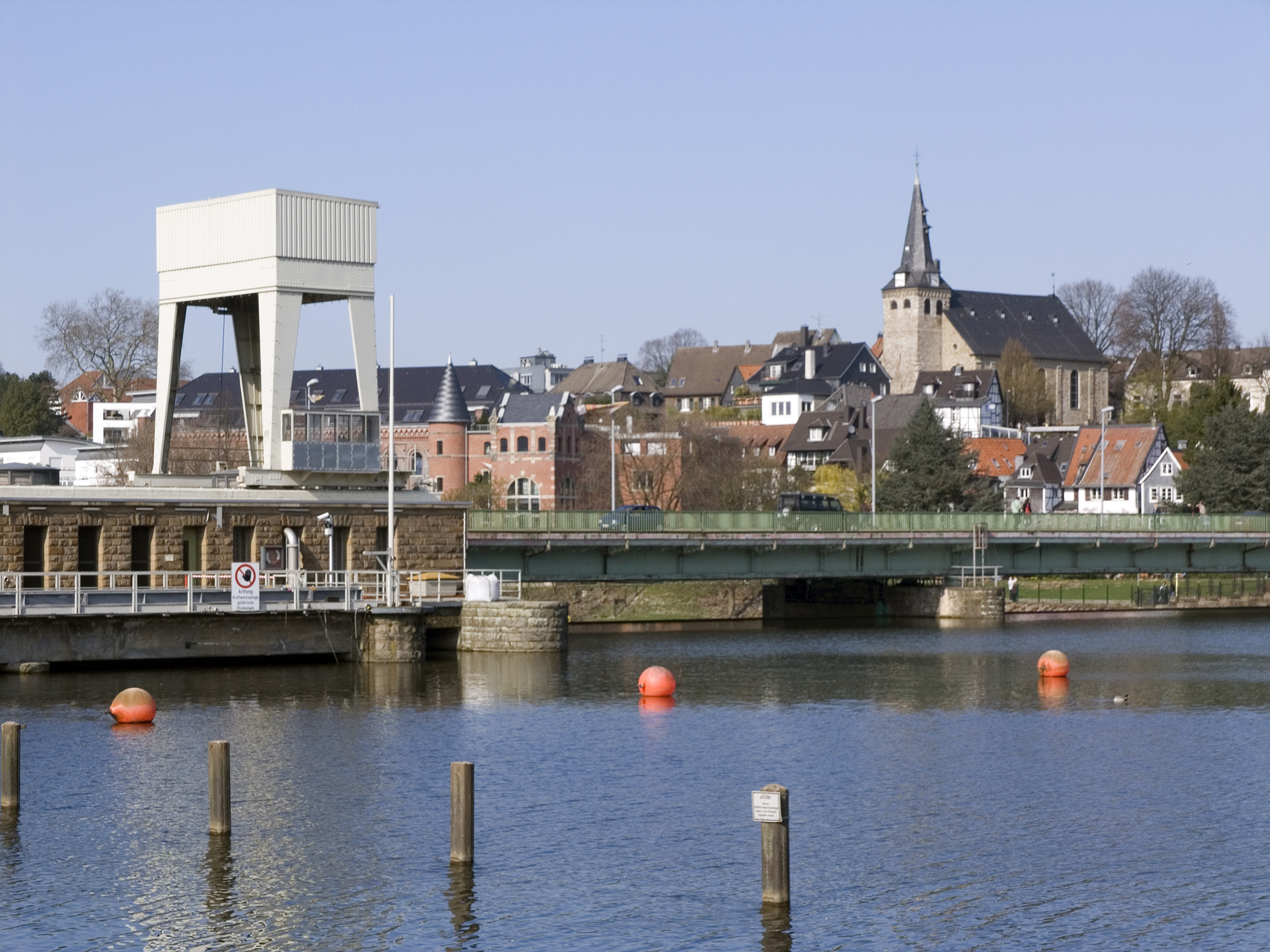 Северный Рейн - Вестфалия, Эссен - плотина на Руре и электростанция в Кеттвиге